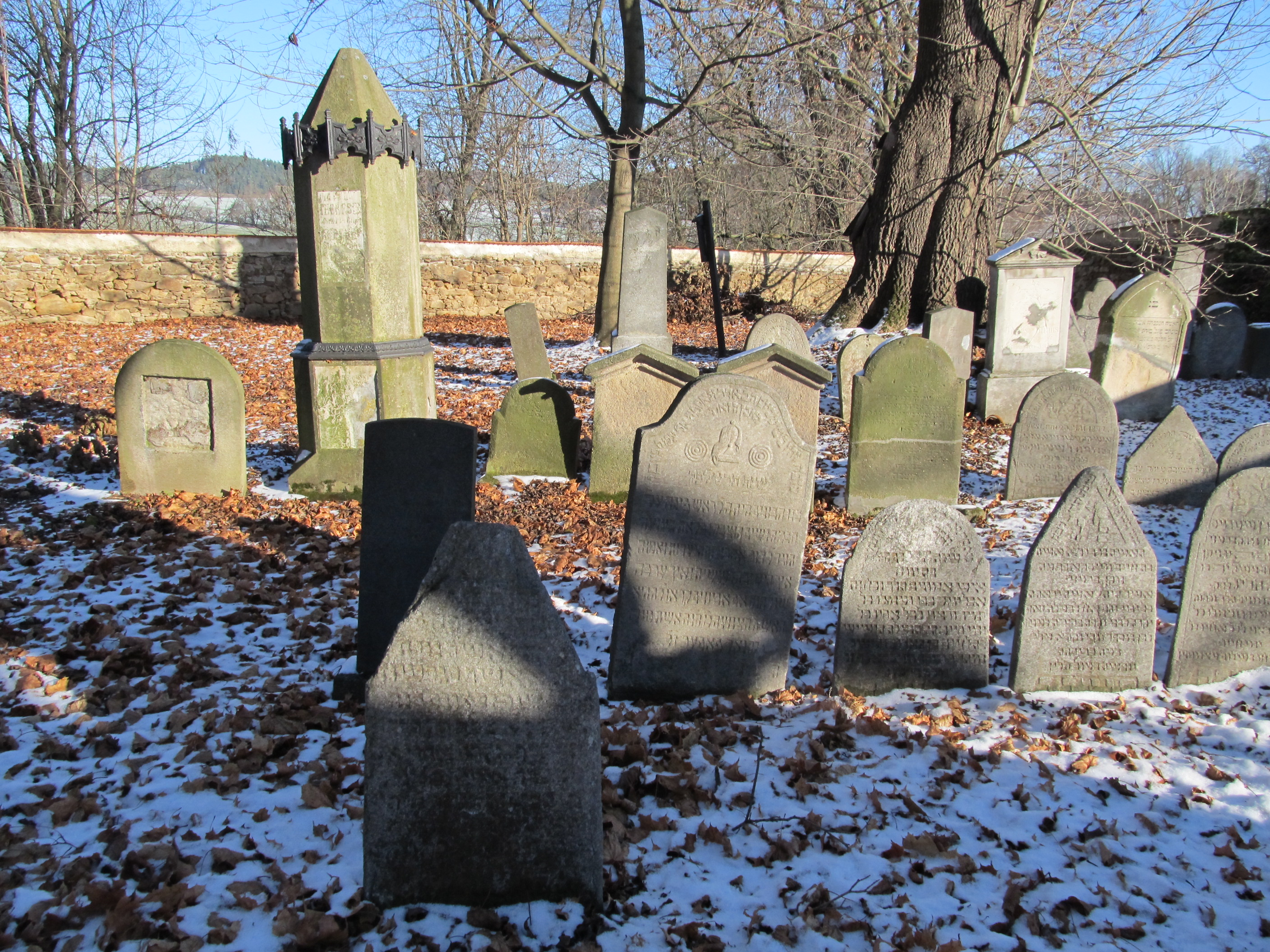 Vlachovo Březí - židovský hřbitov